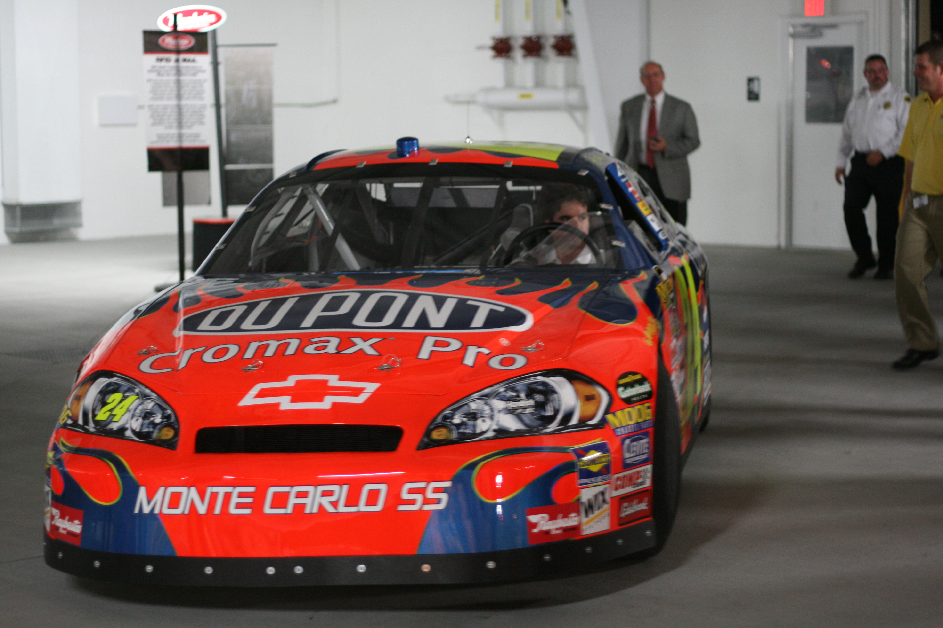 Chevrolet Monte Carlo 2007